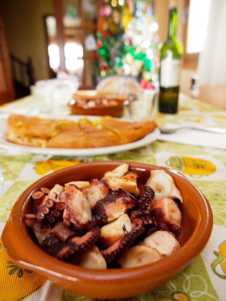 Polbo e empanada, Galiza